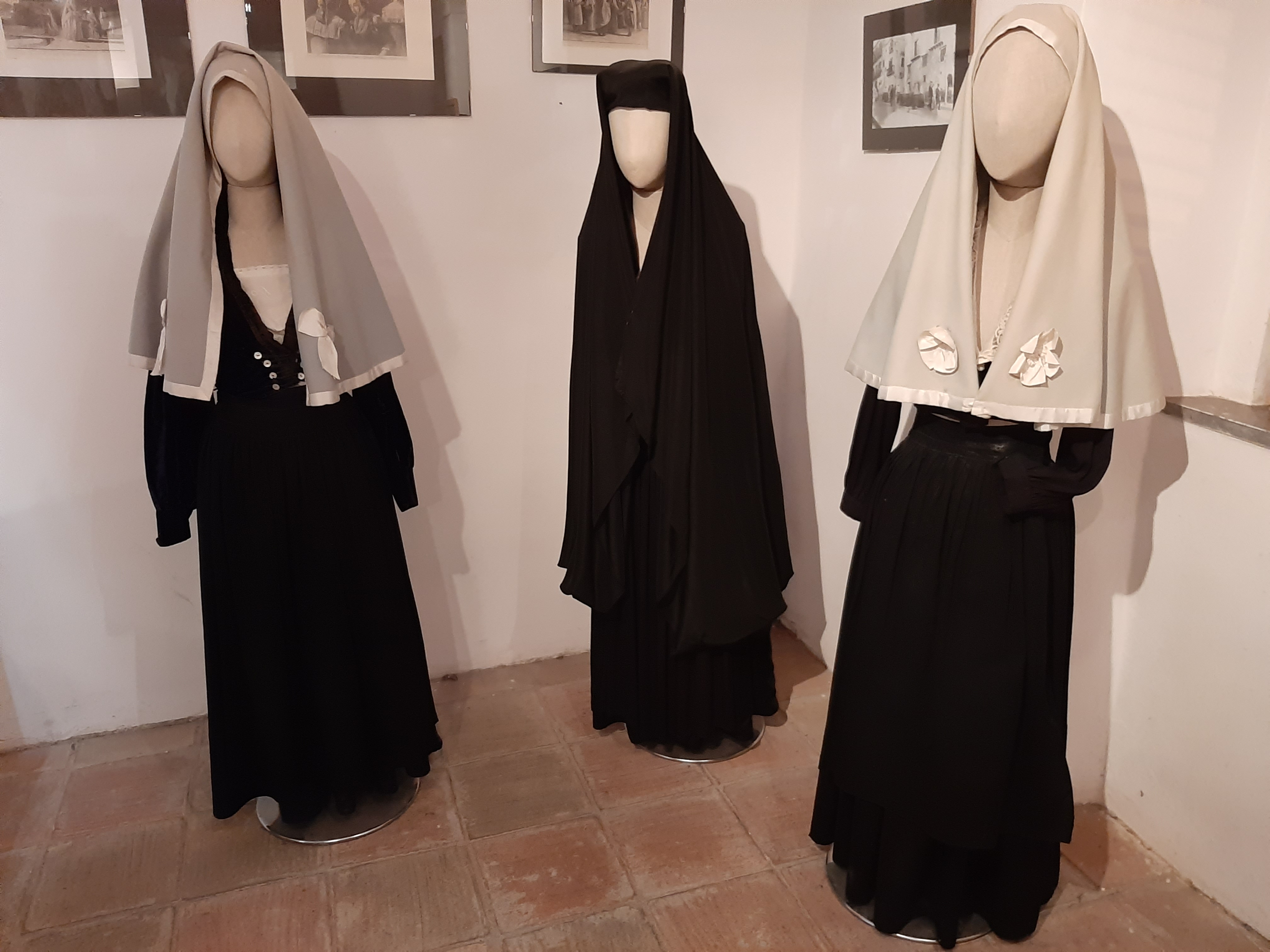 Abiti giornalieri femminili (i due sul lato) e quello tutto nero (seppur esposto in modo errato: non è presente al museo fodhija, ovvero la gonna del venerdì santo, e il manichino ha una gonna di quelle giornaliere) è una versione dell'abito di lutto, caratterizzato dall'ampio mënti, utilizzato dalle donne anche - nella povertà del passato - per ripararsi dal pungente freddo del periodo invernale. Museo Civico Nicola Barbato, Comune di Piana degli Albanesi (PA).